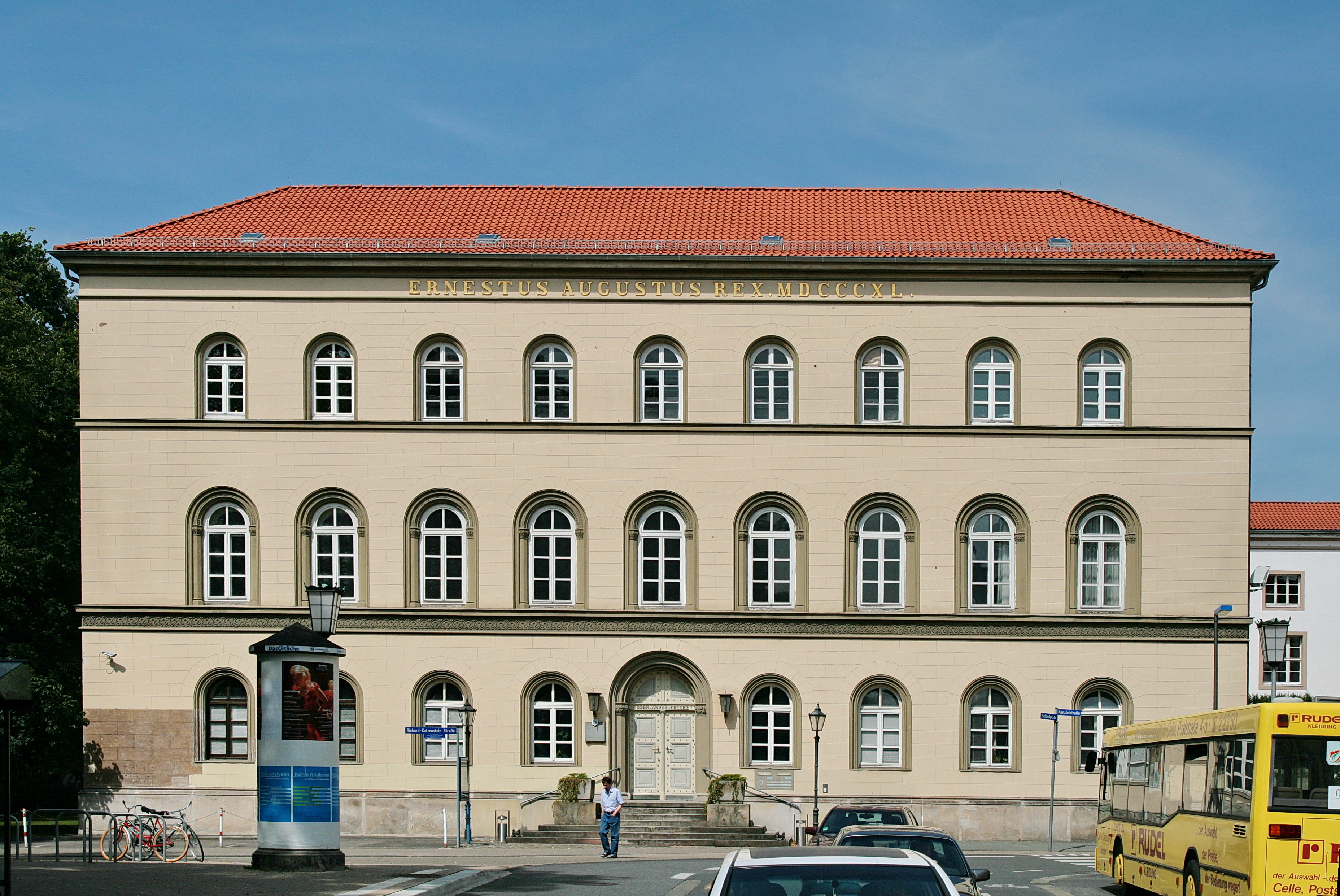 Historisches Gebäude des Oberlandesgerichts Celle, Niedersachsen, Deutschland